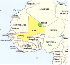 La position de Tessalit, au Mali.